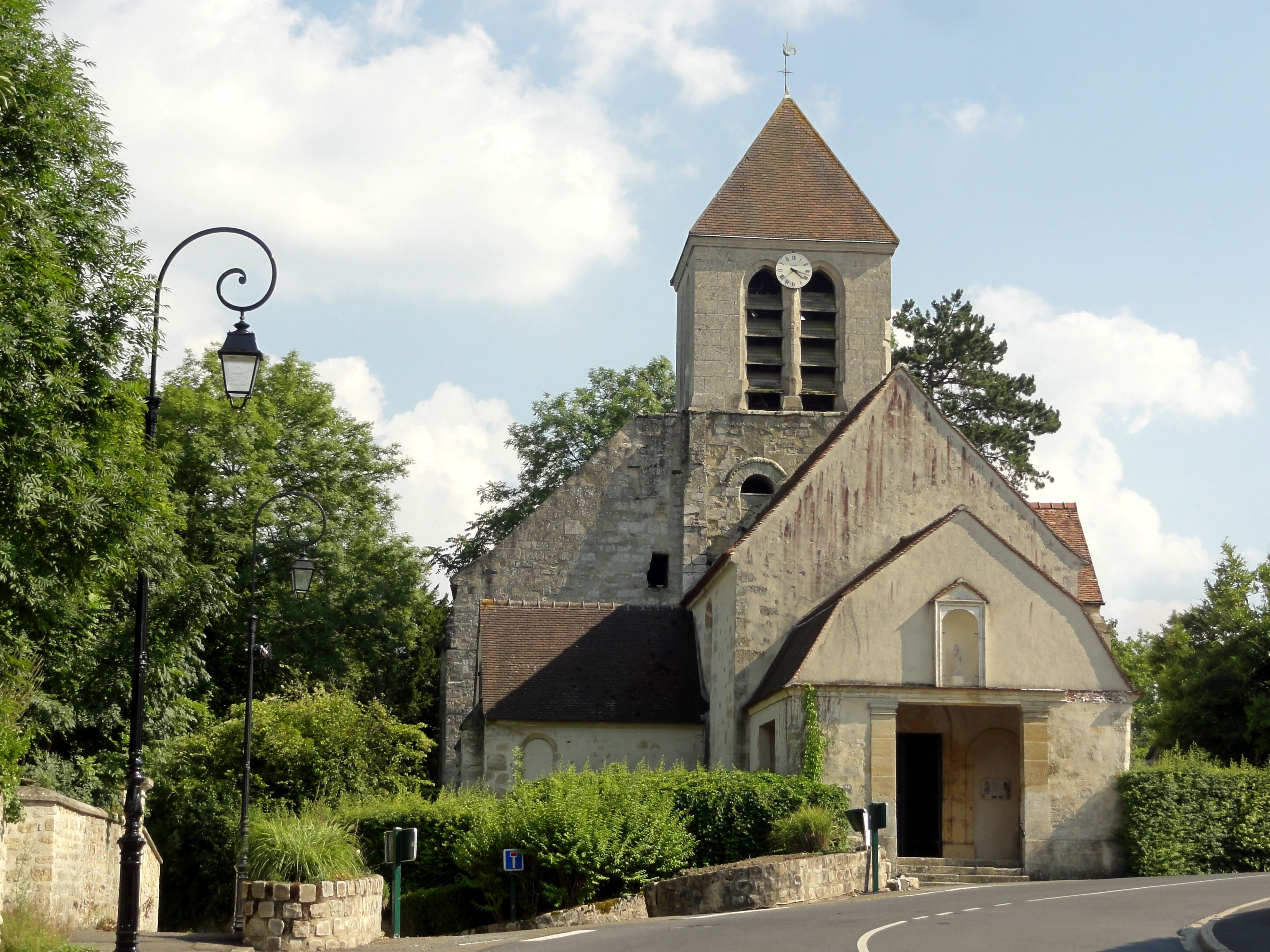 Vue depuis l'ouest.